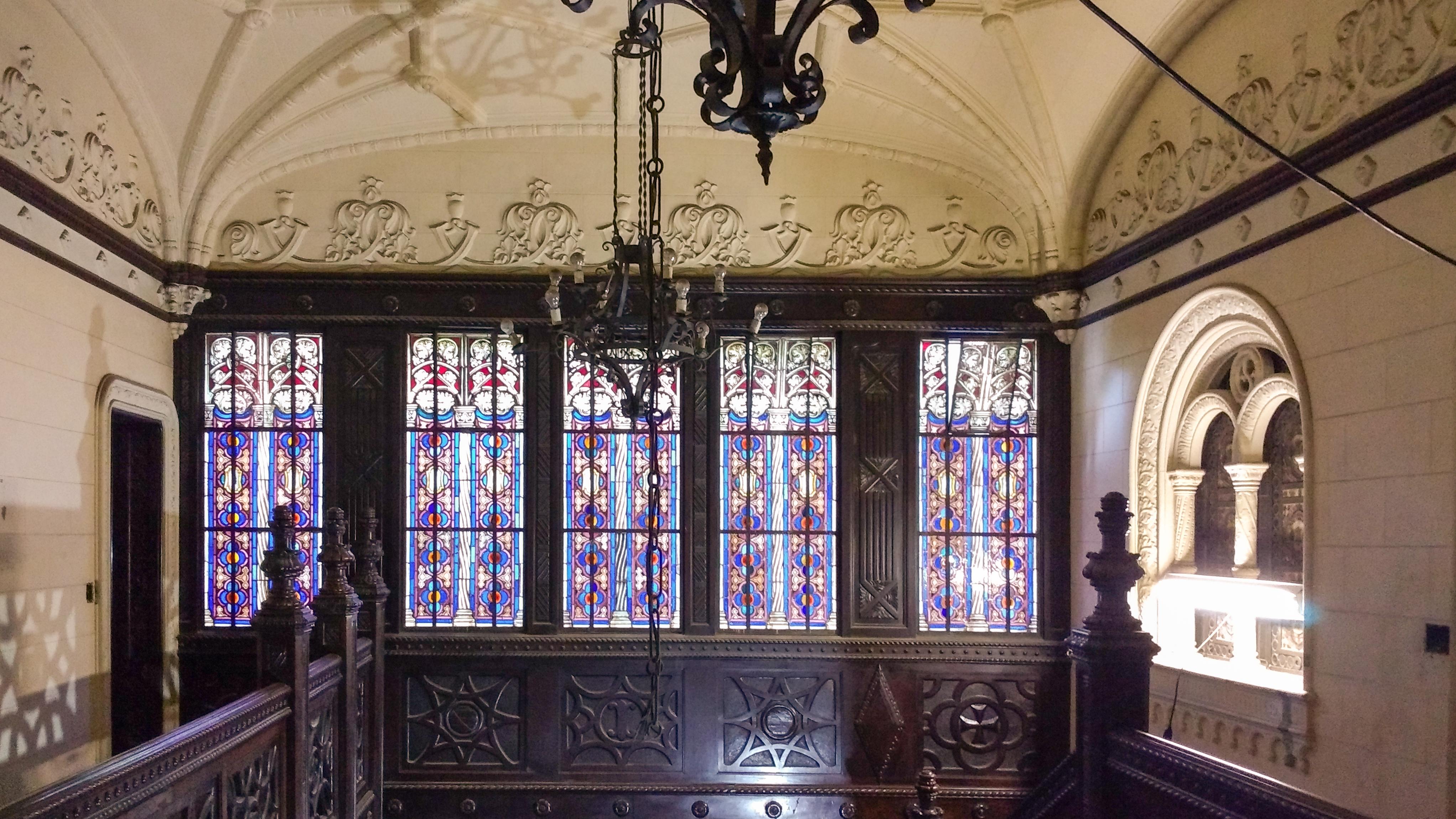 Primeiro andar da Casa de Nhonhô Magalhães, localizada no bairro de Higienópolis, em São Paulo, Brasil.